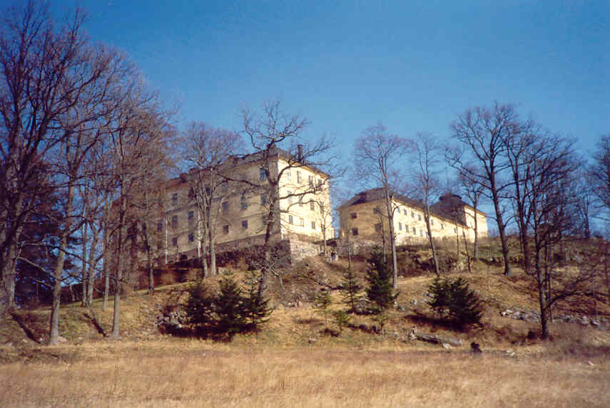 Löfstad slott, Östergötland. Bild tagen av Harri Blomberg.